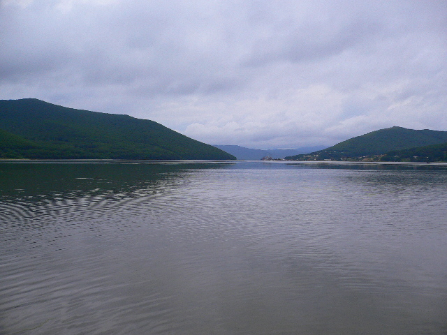 Olga Gulf (Olga Bay)